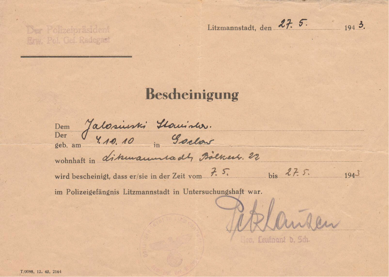 Zaświadczenie o pobycie w więzieniu radogoskim w Łodzi wystawione więźniowi Stanisławowi Jałosińskiemu, w tym czasie wikaremu par. mariawickiej pw. św. Franciszka z Asyżu w Łodzi, ul. Franciszkańska 27. 27 maja 1943. Z podpisem komendanta więzienia Waltera Pelzhausena.